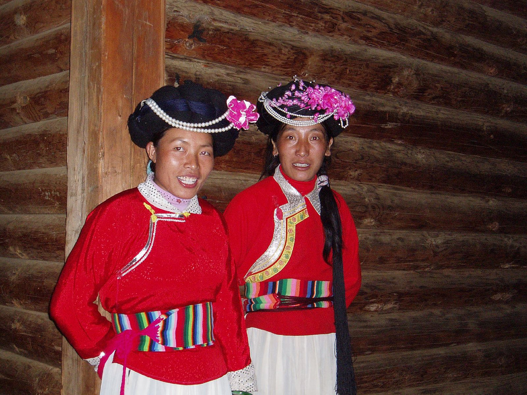 Mosuo girls